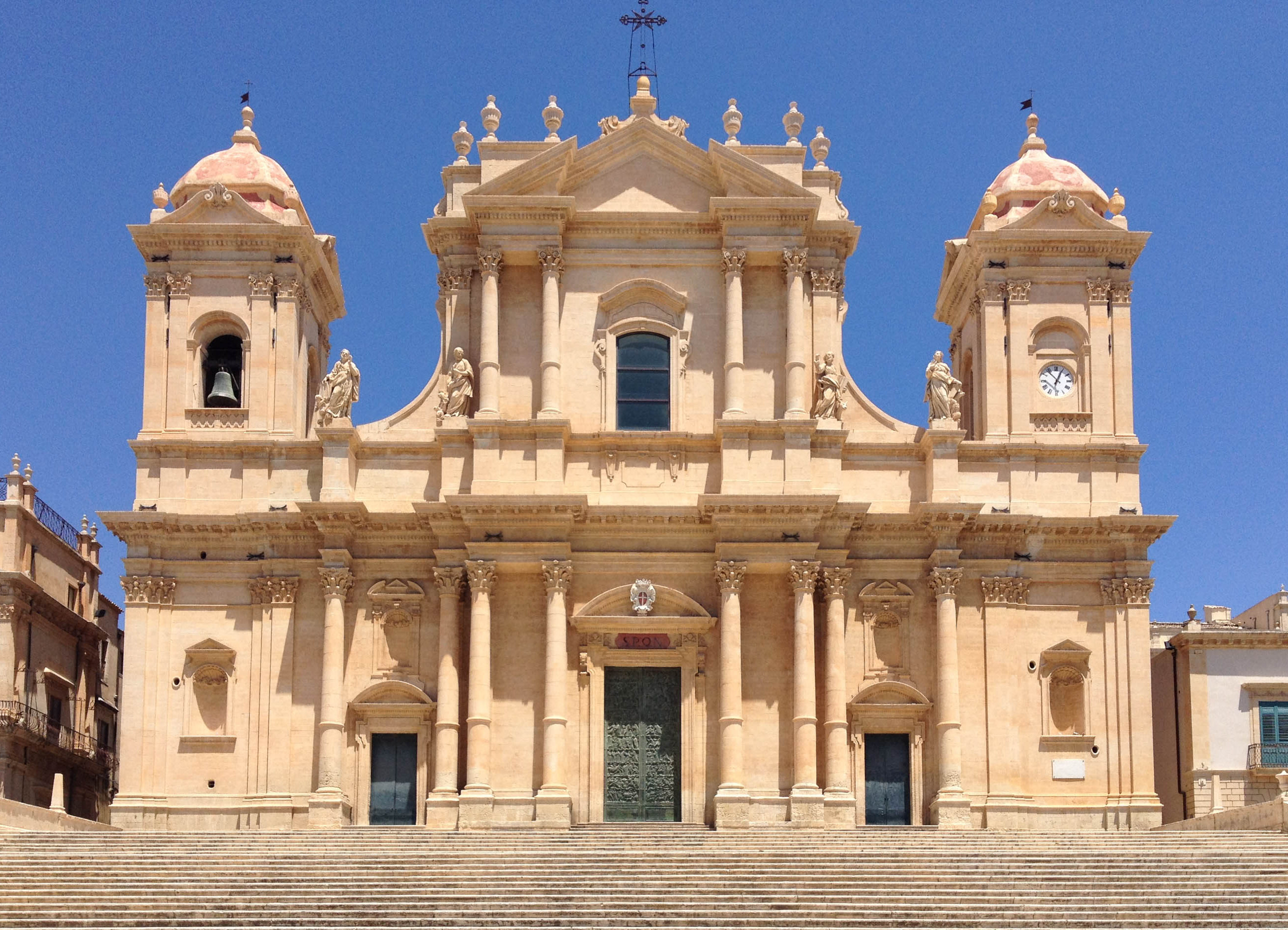 Cattedrale storica di Noto ricostruita dopo il terremoto del 1990